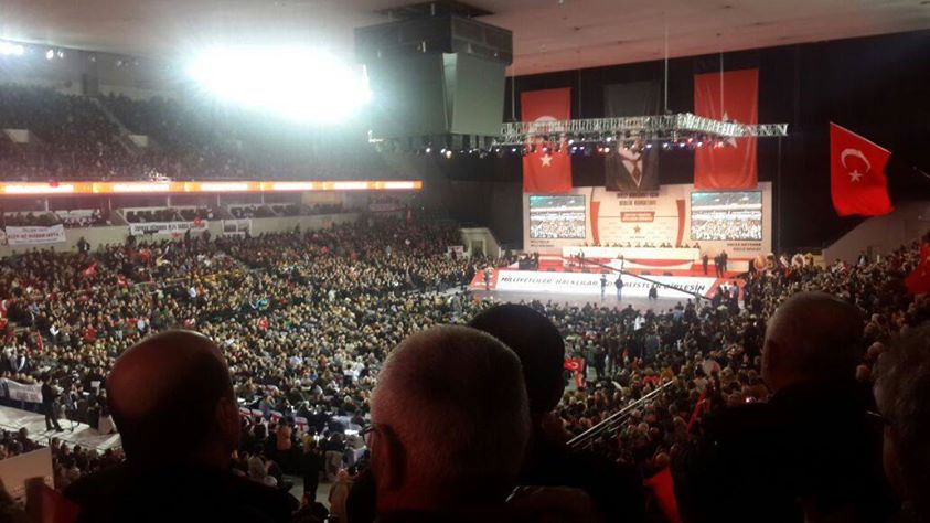 Vatan partisi 2015 kongre